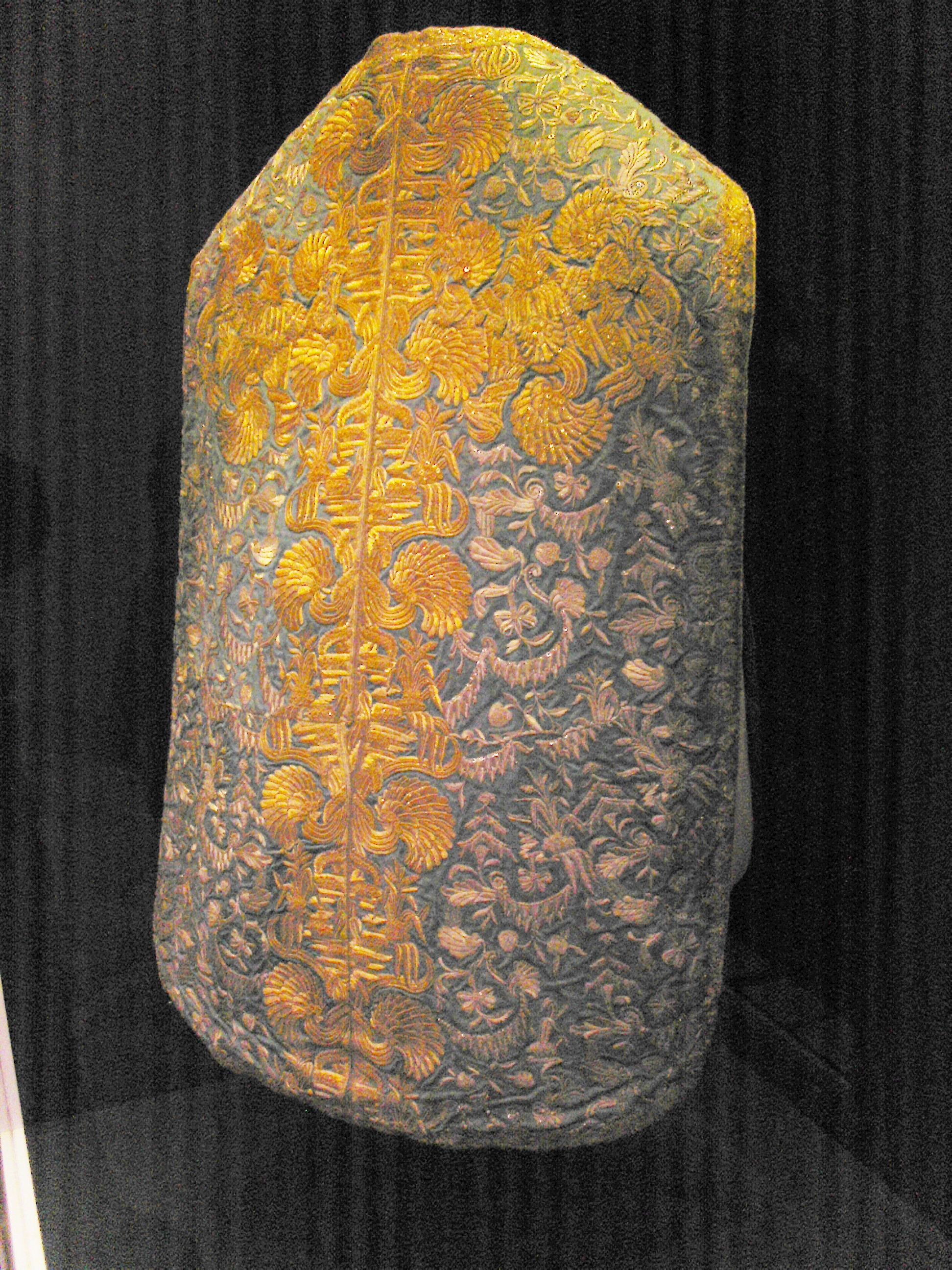 Karl III. Philipp, Kurfürst von der Pfalz, barocke Messkasel, blau, gefertigt aus einem weltlichen Prunkgewand des Kurfürsten, Reiss Museum Mannheim.